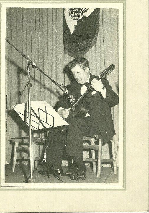 El compositor y profesor de guitarra Emilio Jorge Marche (24/05/1930-01/05/2005) en uno de sus conciertos.